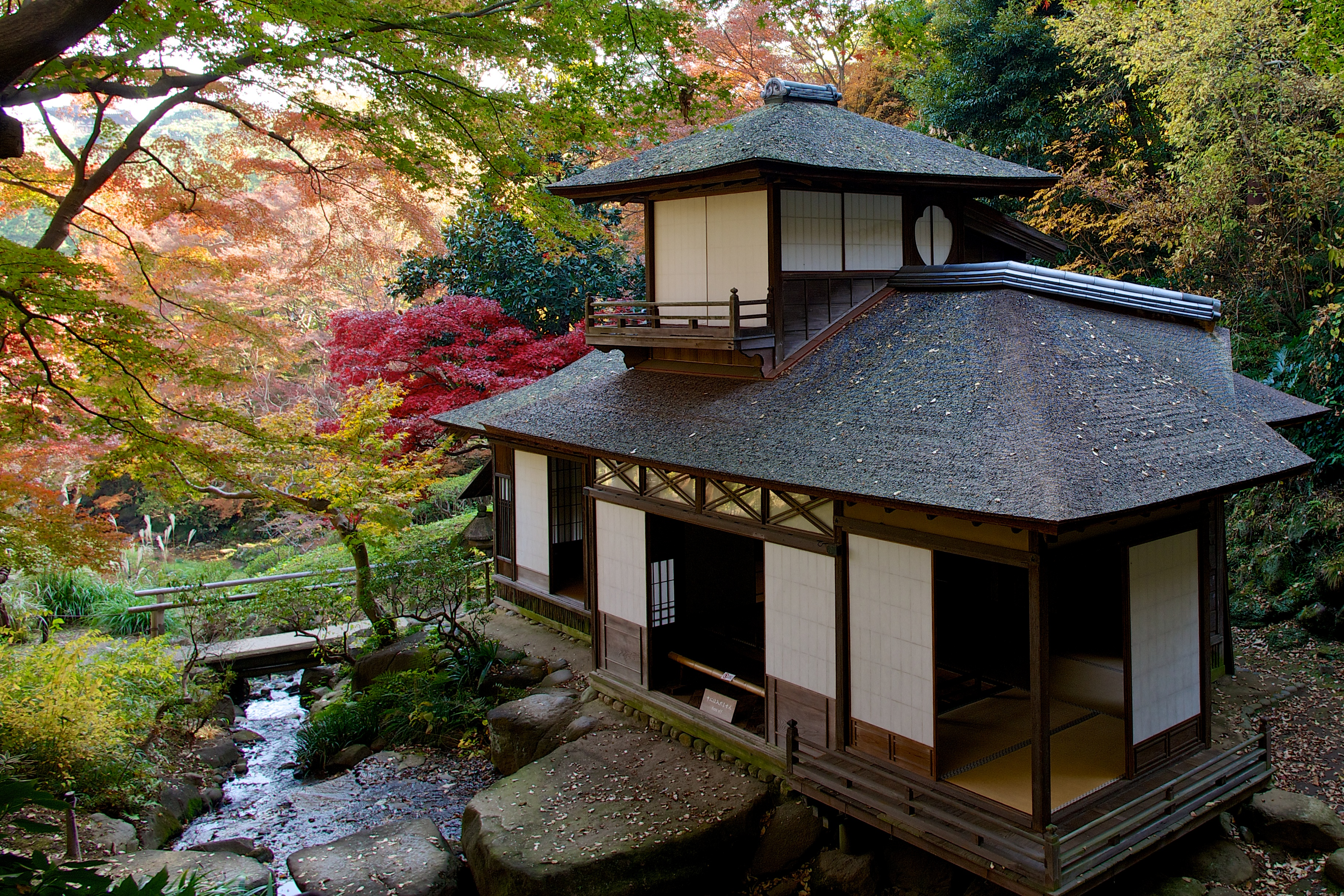 Choshukaku